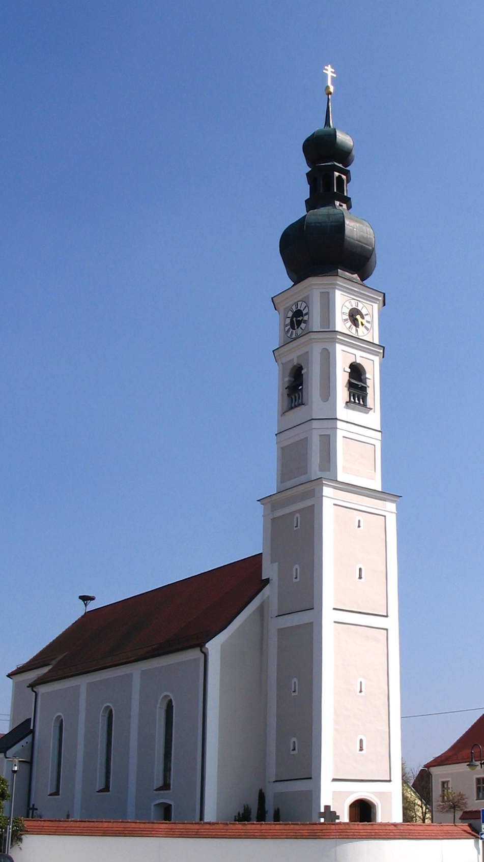 Pfarrkirche Maria Immaculata in Elsendorf, Landkreis Kelheim Niederbayern